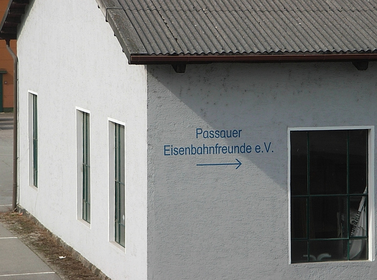 Passauer Eisenbahnfreunde